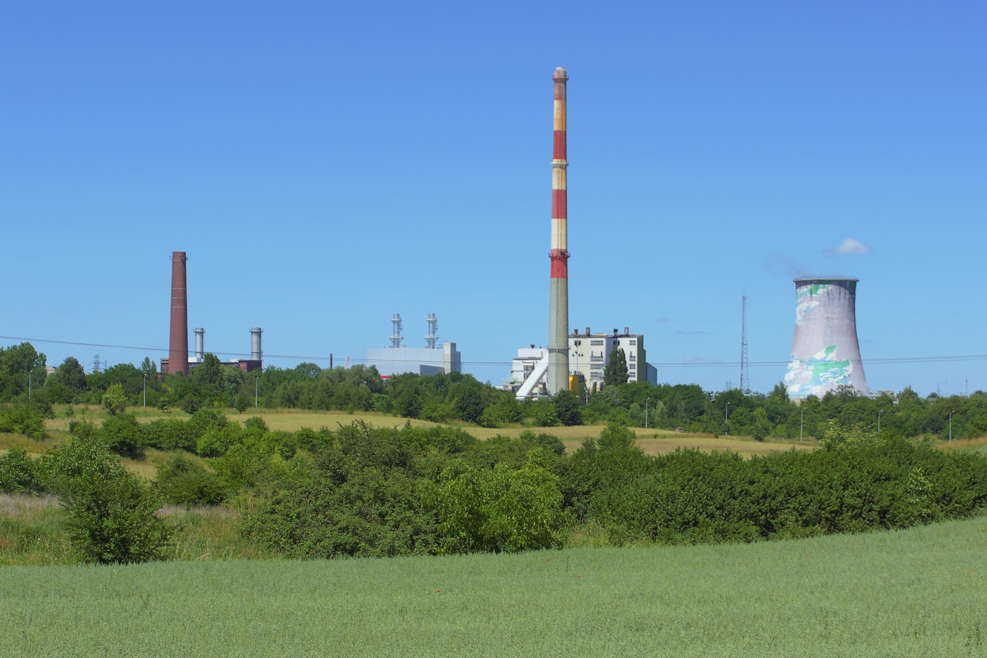 Widok gorzowskiej elektrociepłowni